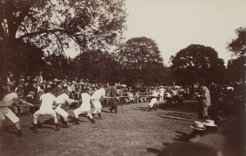 L'équipe de Suède vainqueur du Racing Club de France, au tir à la corde des JO 1900 - vue 91.